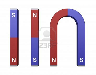 Polos magneticos